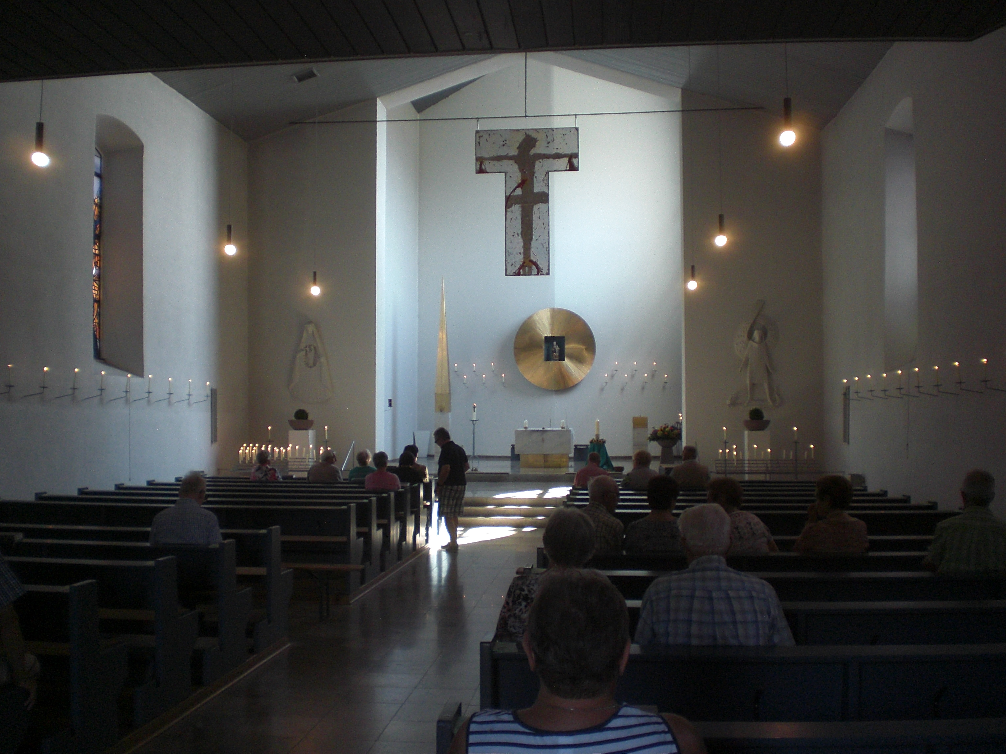 Maria Ehrenberg; Innenansicht der Wallfahrtskirche